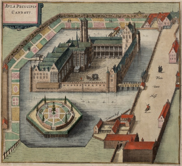 El 'Prinsenhof' en el siglo XVII (por Antonius Sanderus en Flandria Illustrata - 1641)